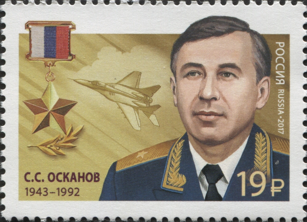 Марка Почты России с портетом Героя России, лётчика-испытателя Осканова Суламбека Сусаркуловича (1943–1992).